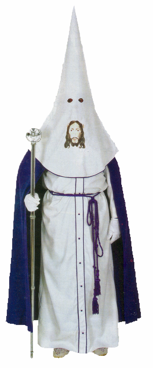 Hábito de la Hermandad de la Santa Mujer Verónica de Ocaña (Toledo)